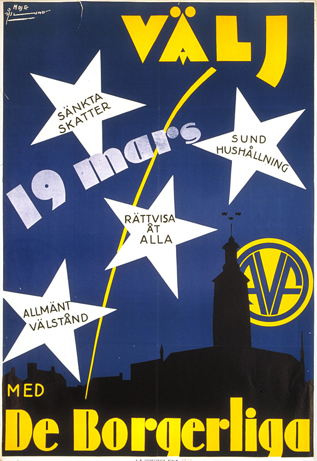 Valaffisch för Allmänna valmansförbundet avsedd för stadsfullmäktigevalet i Stockholms stad den 19 mars 1931.